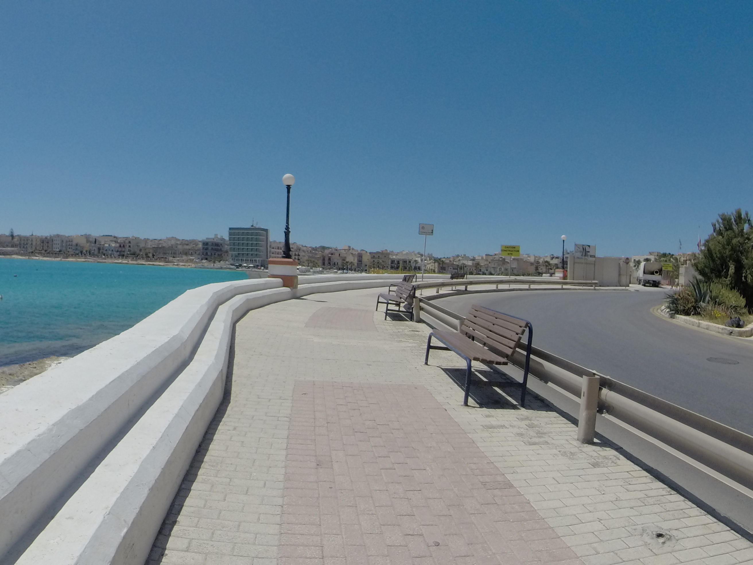 Dawret il-Qalb Mqaddsa, Birżebbuġa, Malta